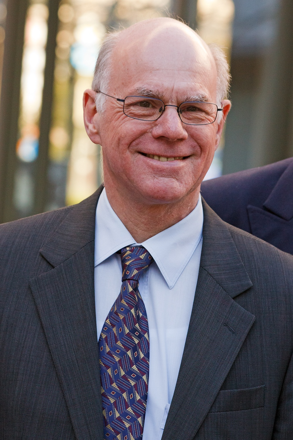 Eröffnung Woche der Brüderlichkeit, Lübke-Museum, Hamm, Datum/Uhrzeit: 20.03.2011 17:02:46